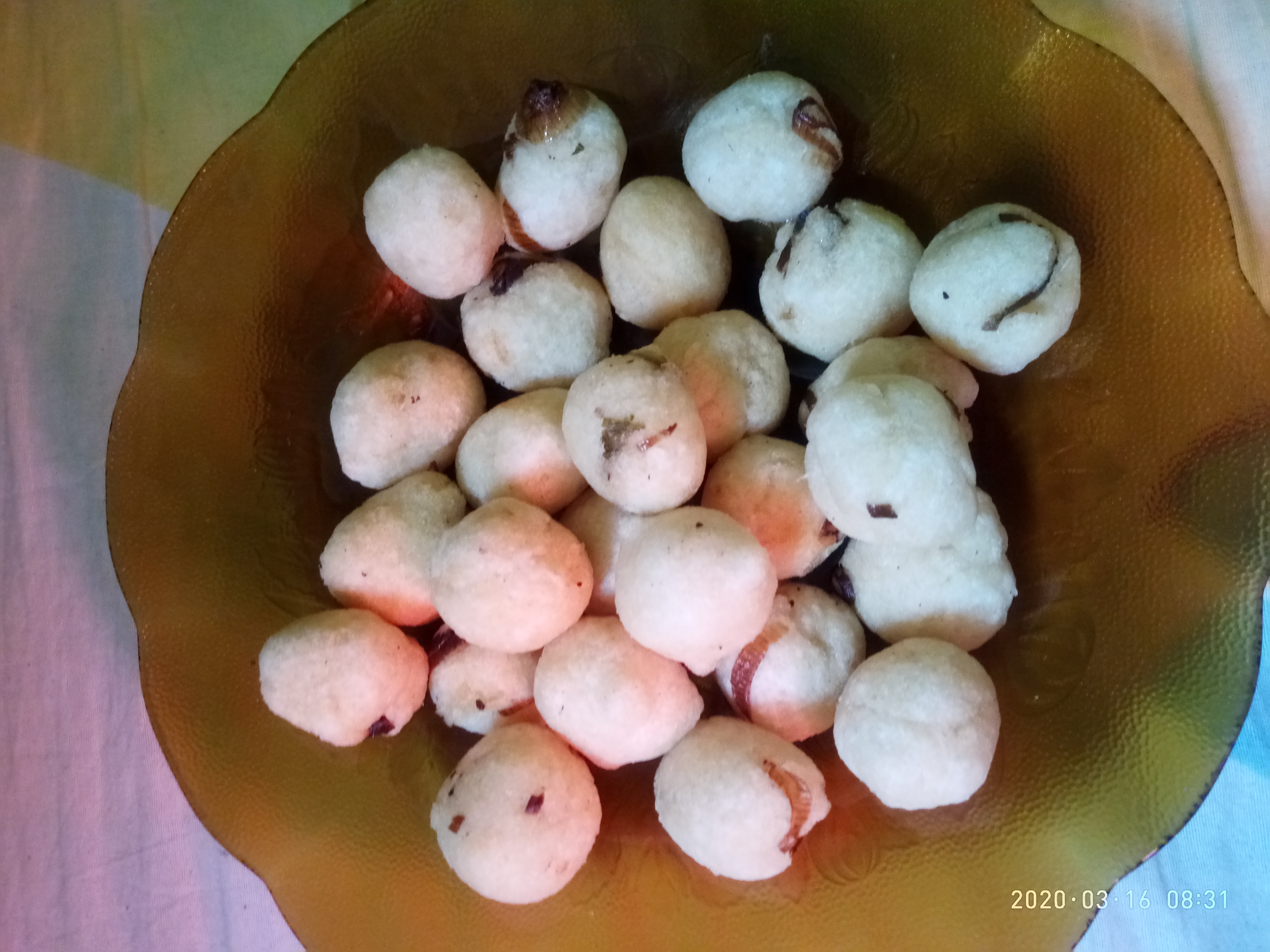 OndolMakanan